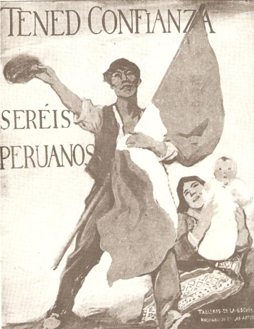 Pintura de la Escuela Nacional de Bellas Artes destinada a las poblaciones peruanas de Tacna y Arica